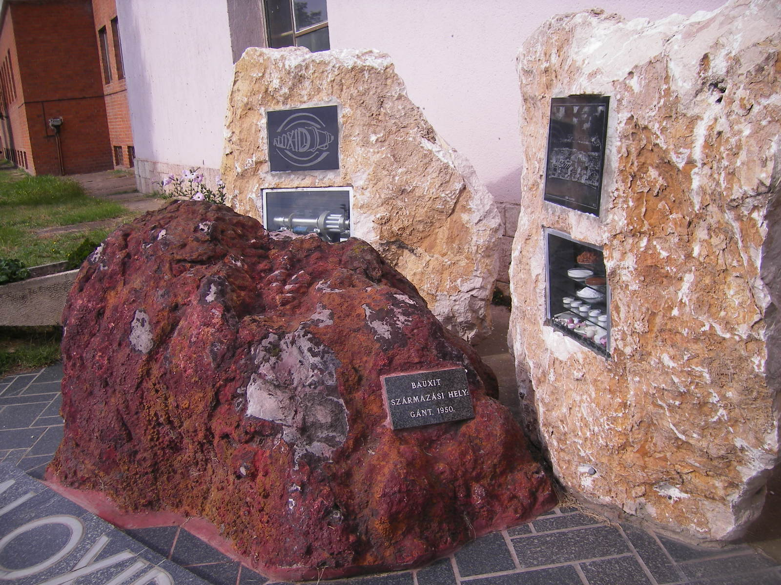 Almásfüzitő - timföldgyár